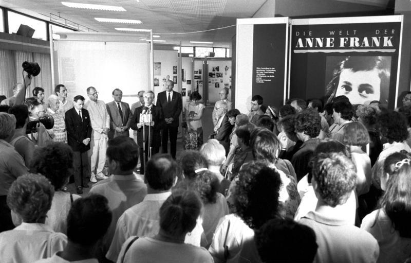 Berlin, Eröffnung Anne-Frank-Ausstellung ADN-ZB/Senft 7.7.89 Berlin: Ausstellung/ "Die Welt der Anne Frank 1929 - 1945", eine gemeinsame Ausstellung der Anne Frank Stiftung Amsterdam, des Berliner Magistrats und der Jüdischen Gemeinde von Berlin, öffnete im Ausstellungszentrum am Fernsehturm ihre Pforten. Anwesend waren auch Cornelis Suijk (am Mikrophon), Direktor für internationale Zusammenarbeit der Anne Frank Stiftung Amsterdam, Berlins Oberbürgermeister Erhard Krack (5. v. l.) und Dr. Peter Kirchner (4. v. l.), Vorsitzender der Jüdischen Gemeinde von Berlin. Abgebildete Personen: Krack, Erhard: Mitglied des Ministerrates, Oberbürgermeister von Berlin, DDR Kirchner, Peter: Vorsitzender der jüdischen Gemeinde Berlin, DDR